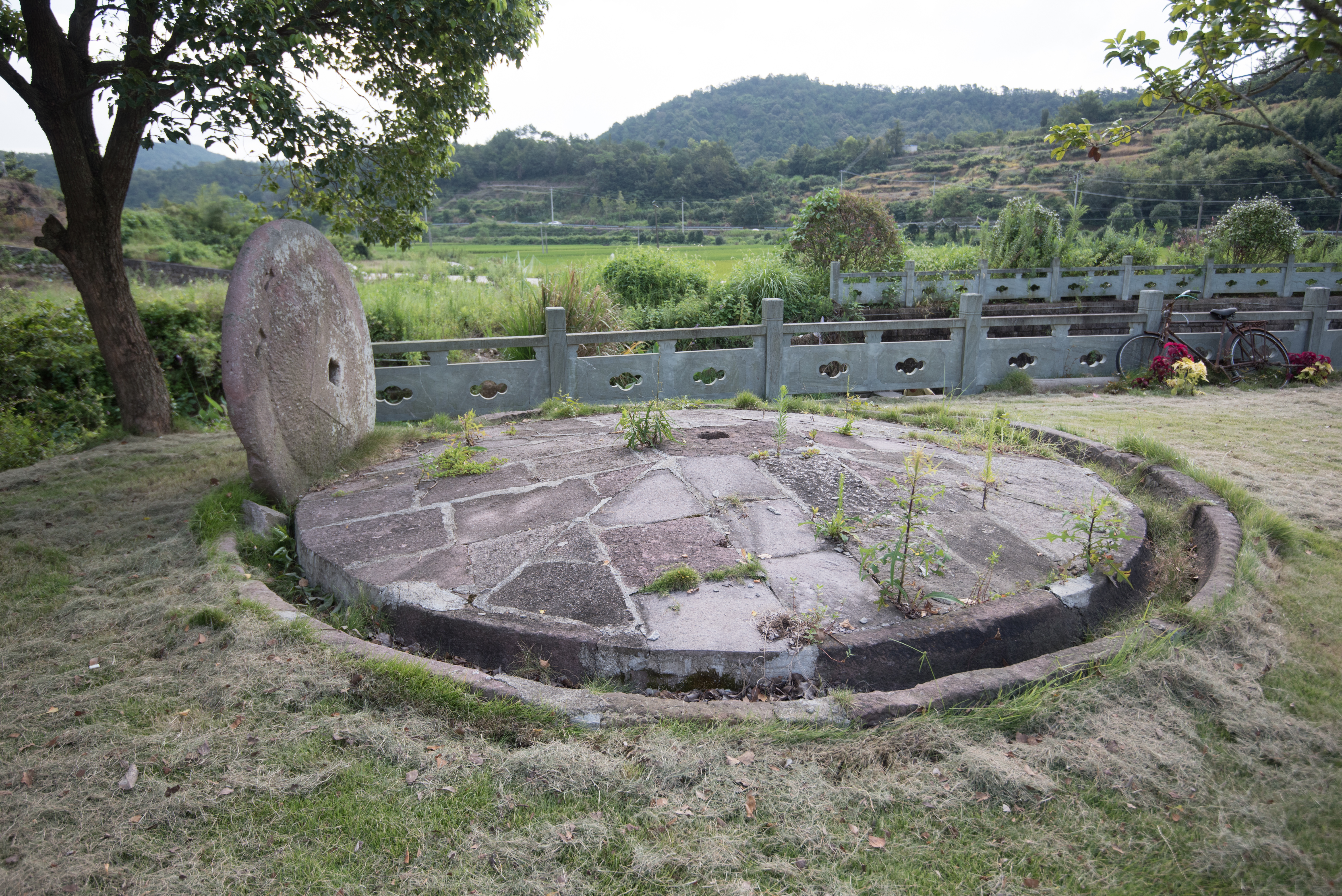 宁海石碾群——西岙石碾群（老爷庙石碾）